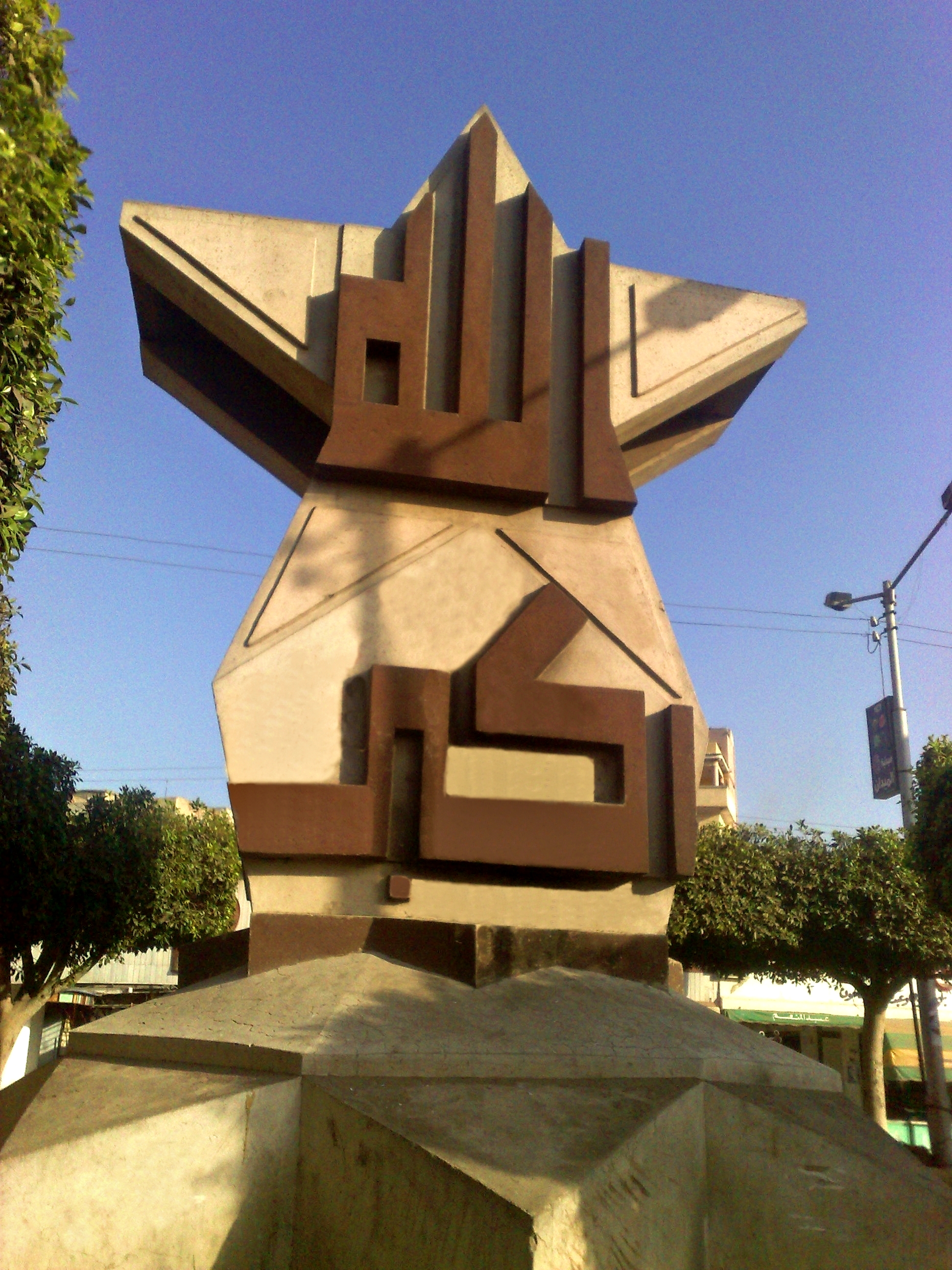 نصب تذكاري مكتوب عليه "الله أكبر" أمام المسجد الإبراهيمي، دسوق